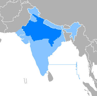 Donde es mayoritario Donde es minoritario